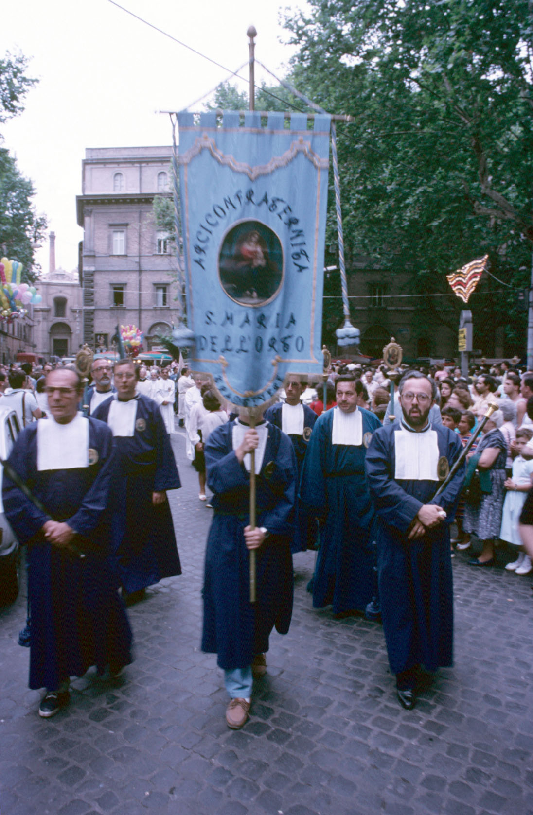 Arciconfraternita di S. Maria dell'Orso